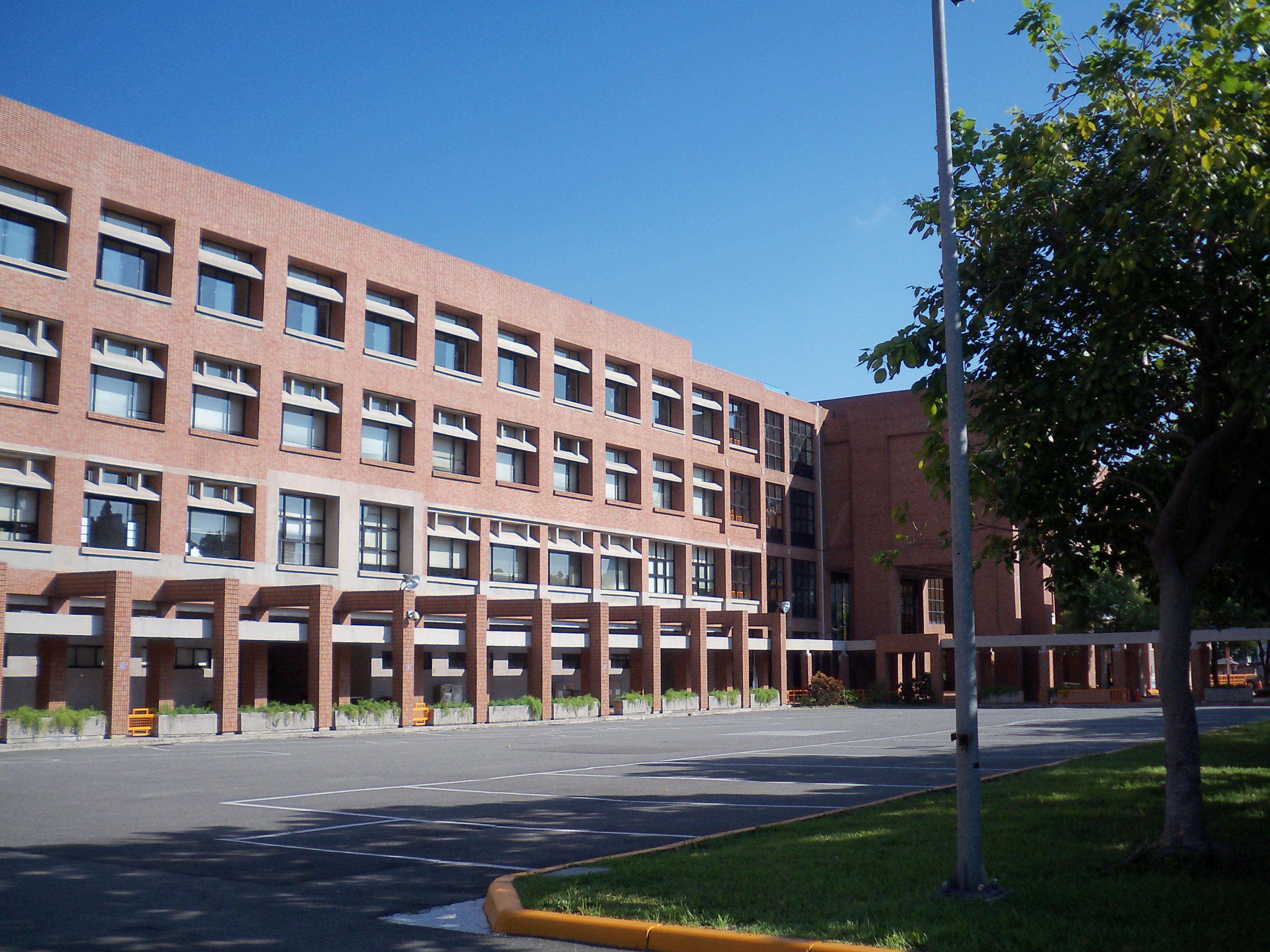 臺北美國學校校舍。